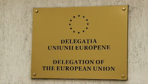 Delegation of the European Union to Moldova Delegația Uniunii Europene în Republica Moldova